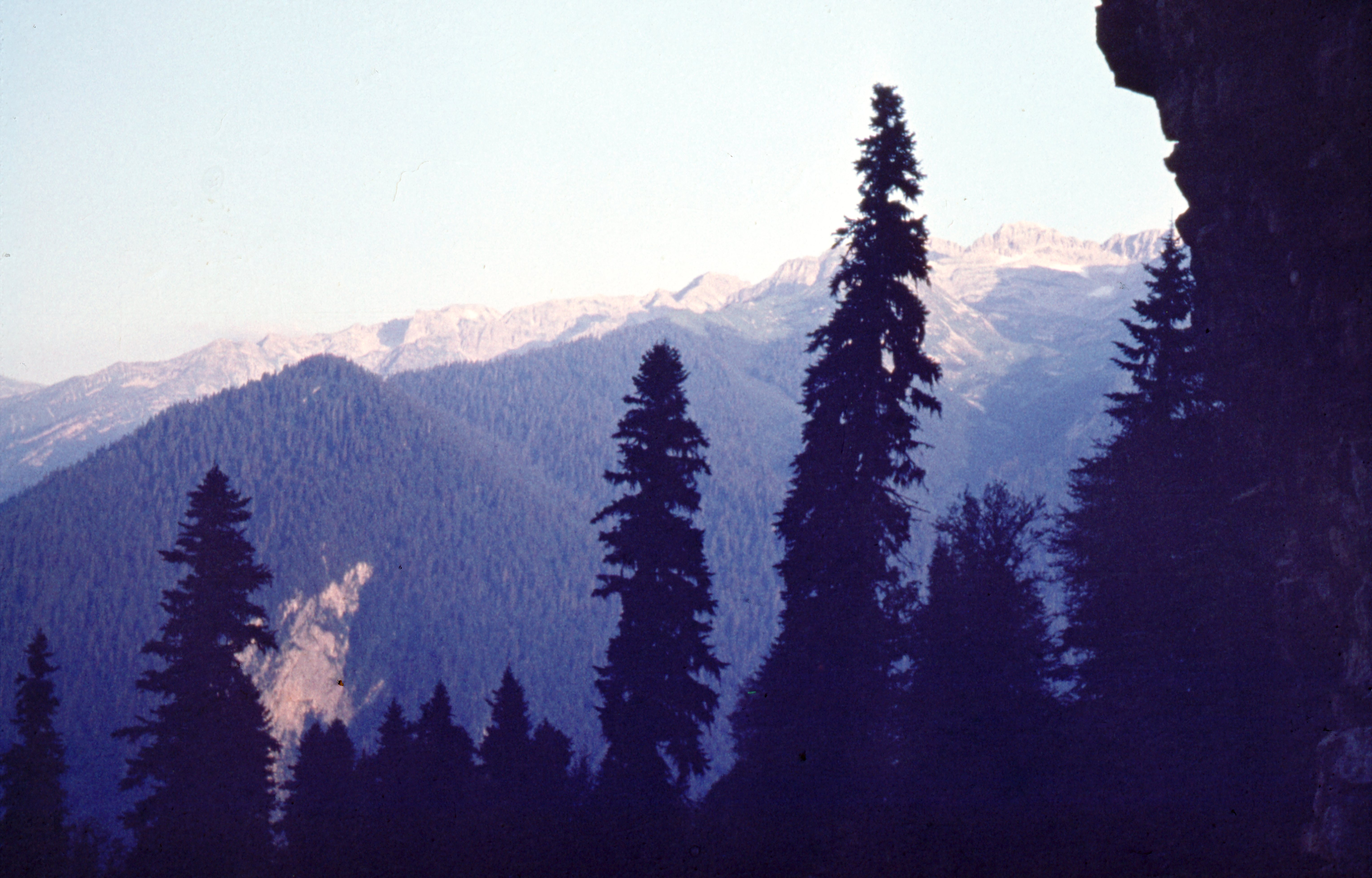 Абхазия. Бзыбский хребет с севера